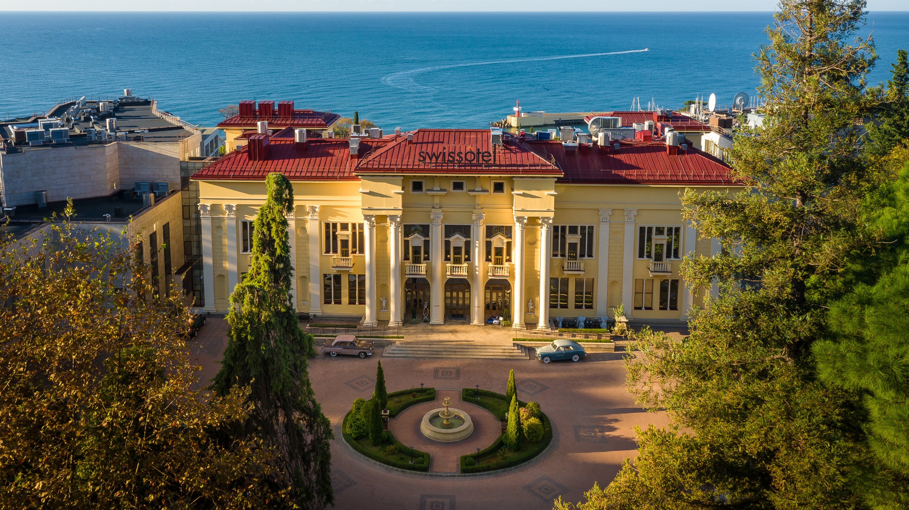 Свиссотель Резорт Сочи Камелия вид со стороны города